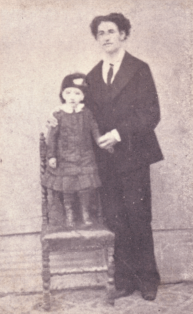 Fotografía familiar de José Alonso y Trelles (derecha), escritor uruguayo (1857 - 1924).